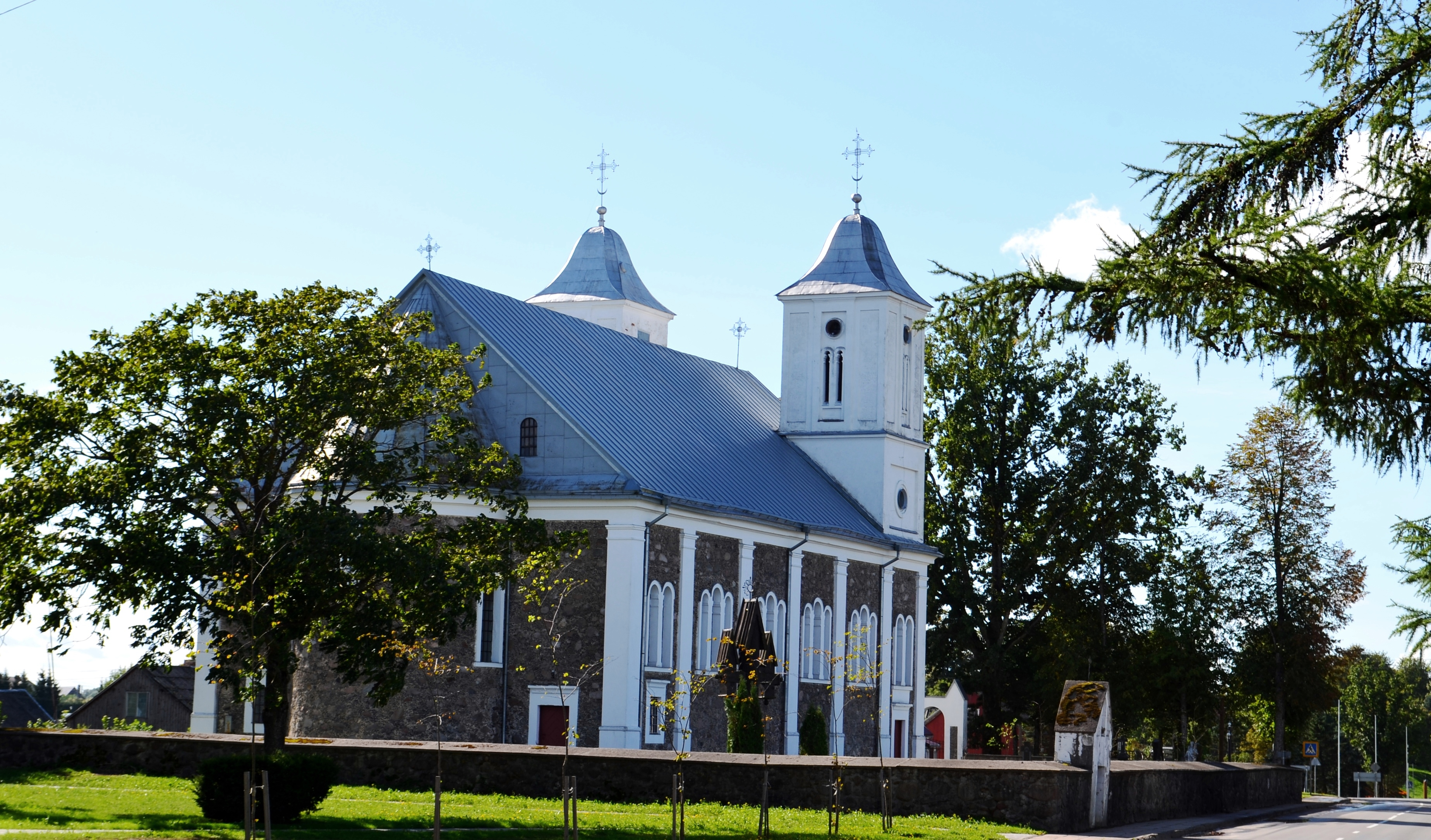 Žemaitėška: Vainota bažninčė, Šėlotės rajuons